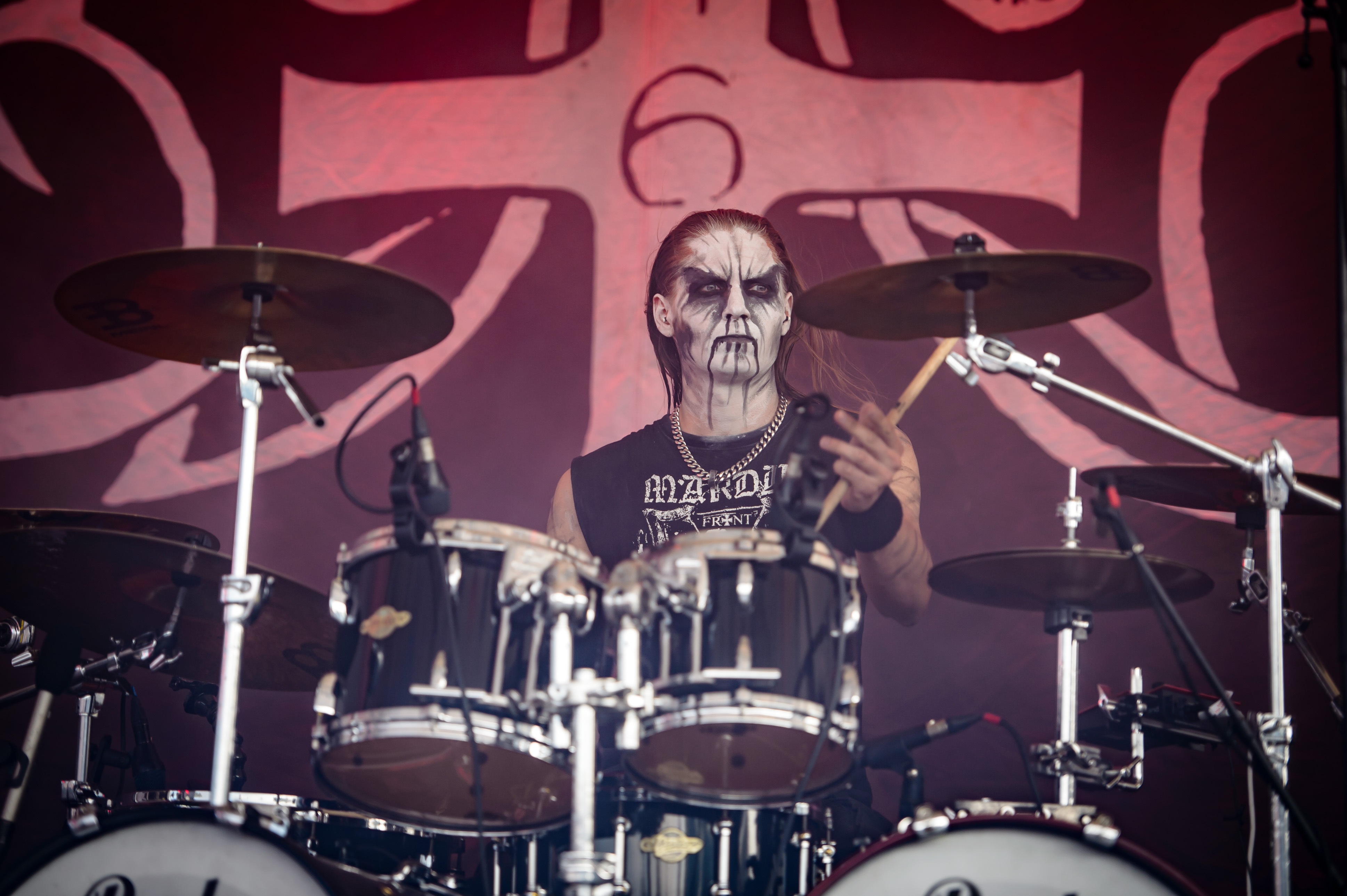 'Rock Hard Festival 2018; Amphitheater Gelsenkirchen': 'Marduk'